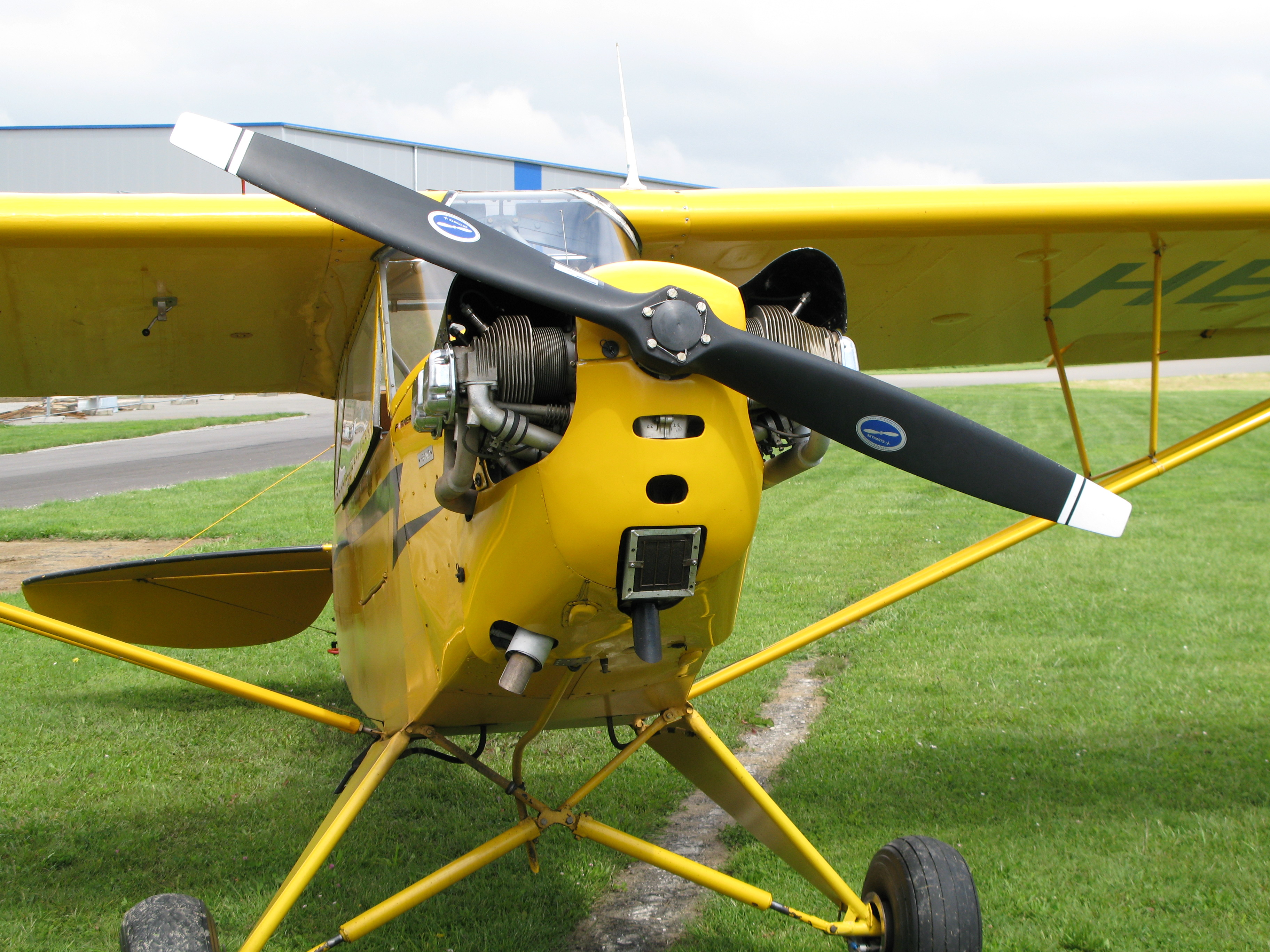 Piper J-3C-65 Cub